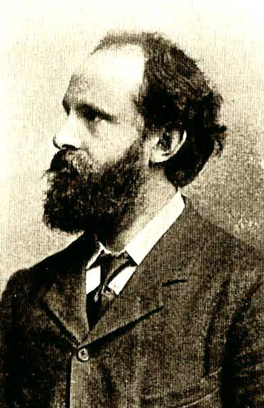 Российский журналист, революционер Давид Владимирович Соскис (1866-1941)